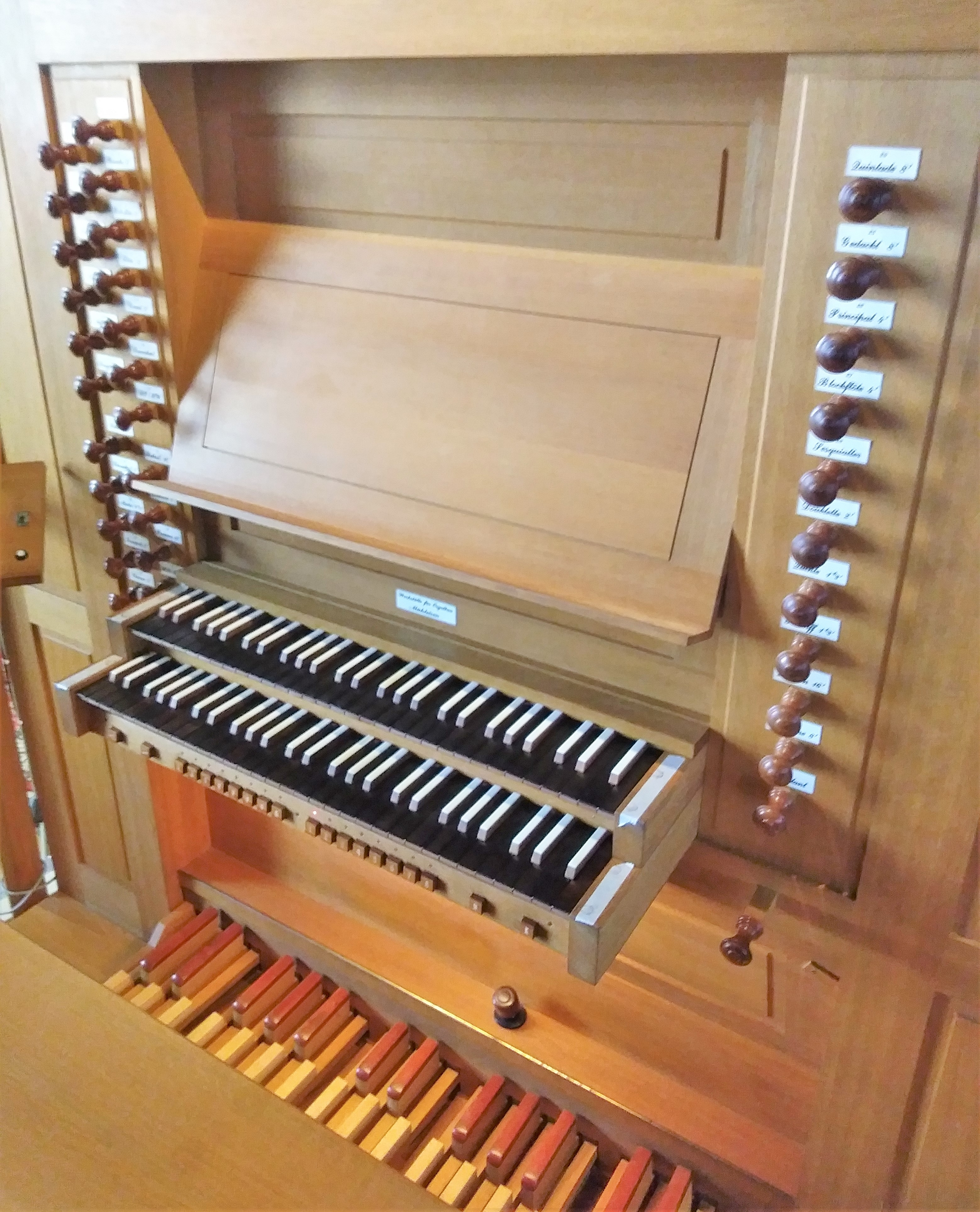 Mühleisen-Orgel von St. Bartholomäus (Hasborn-Dautweiler)